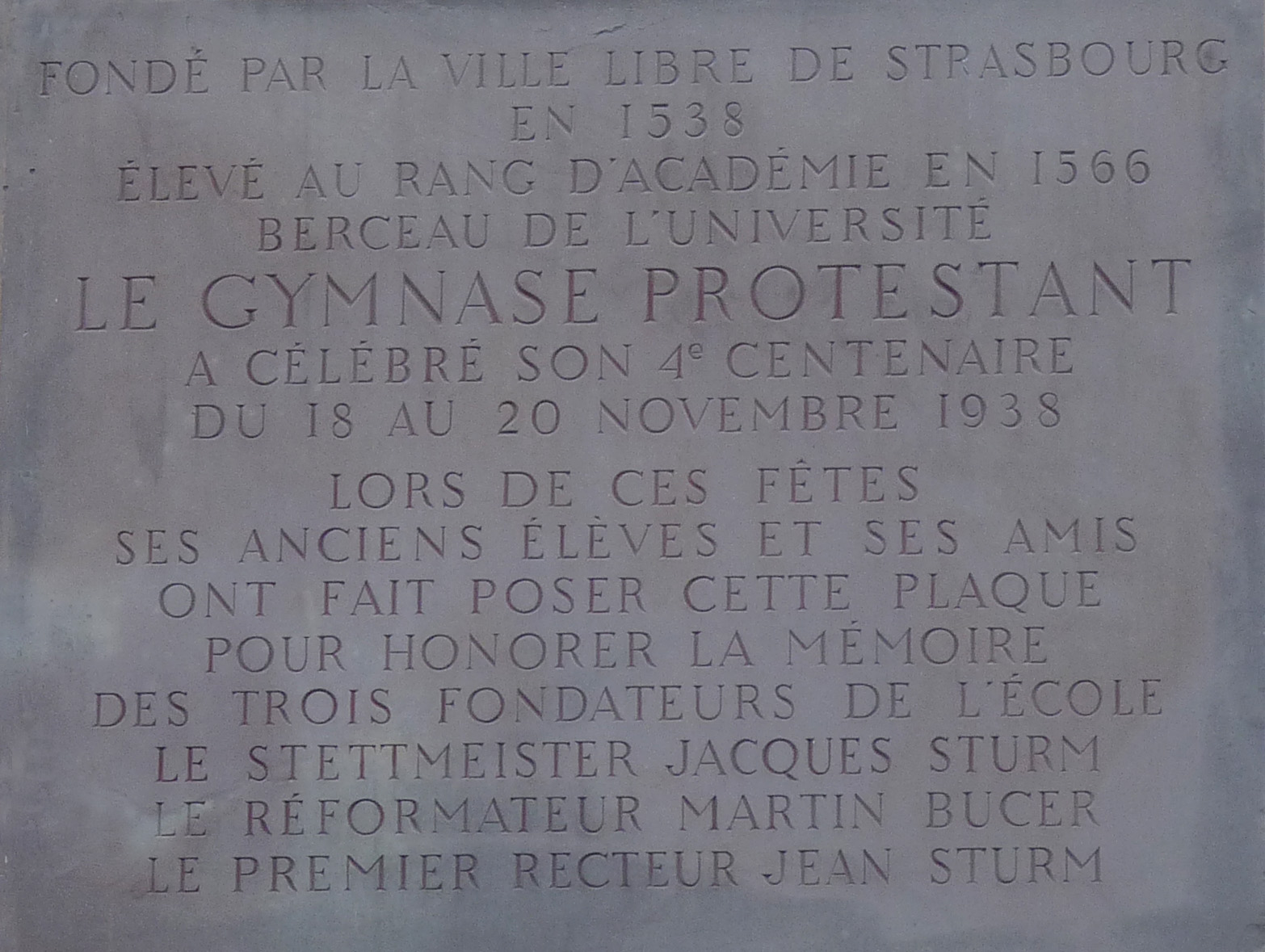 Plaque commémorative sur la façade du Gymnase Jean-Sturm à Strasbourg